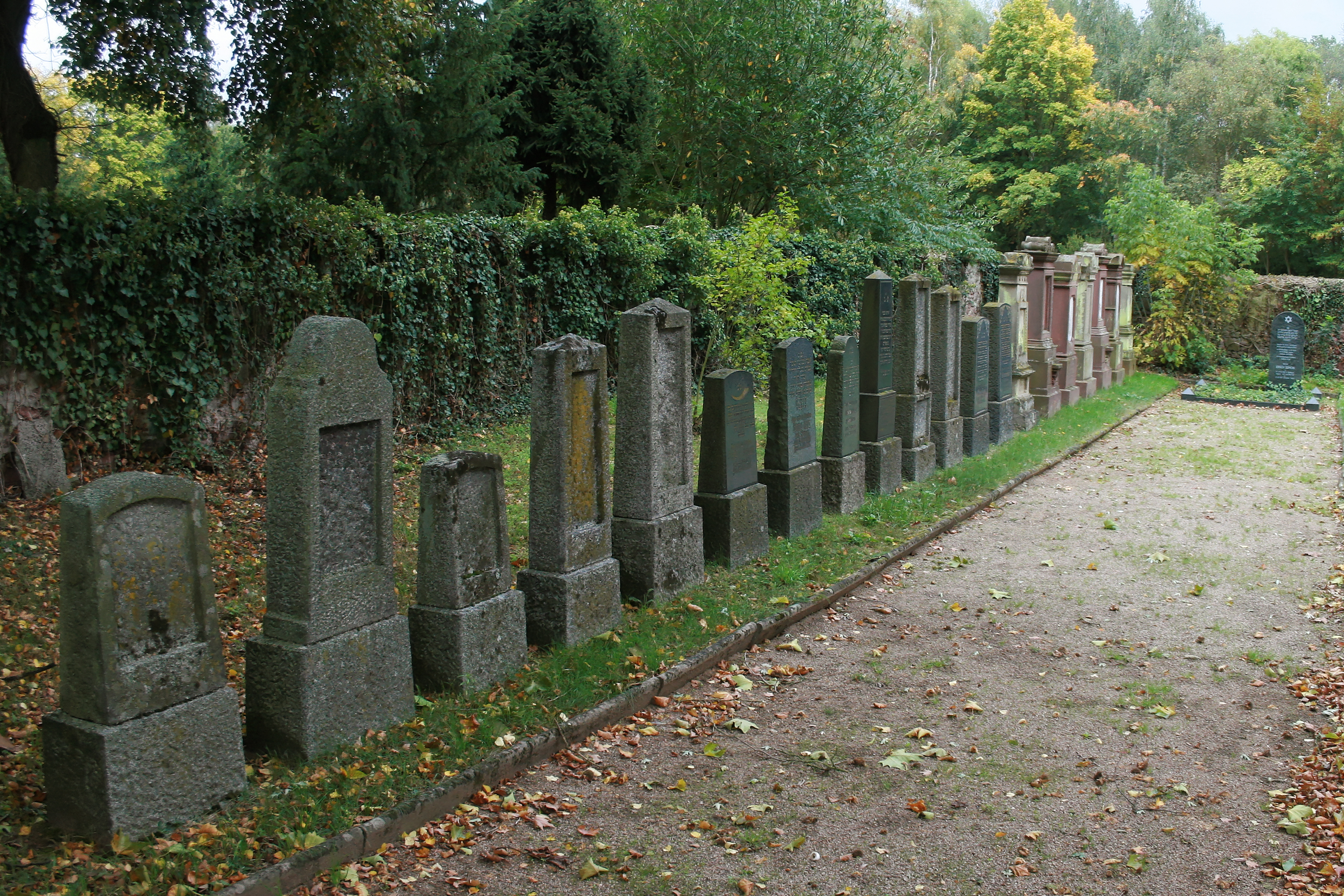 Jüdischer Friedhof in Egelsbach (Hessen).